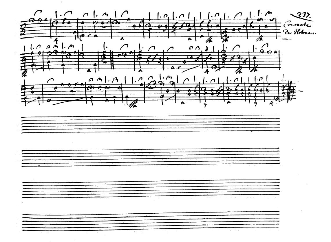 Courante de Nicolas Hotman dans le Ms. Vaudry de Saizenay (Besançon BM : Ms. 279152-153, f. 237).